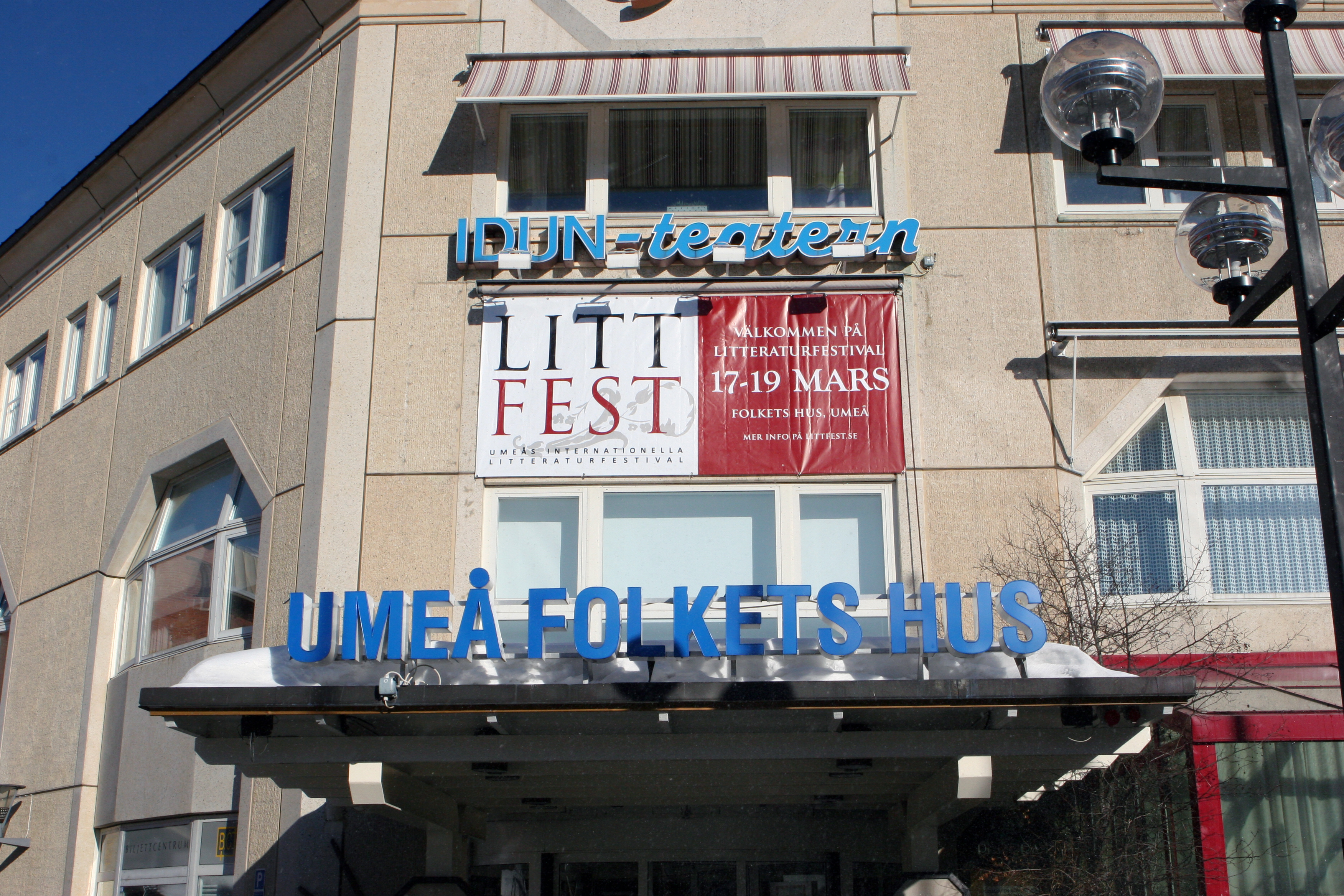 Umeå Folkets hus.